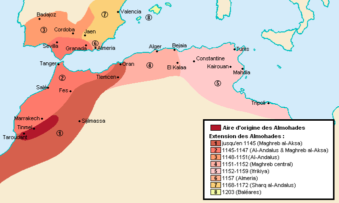 Extensions de l'Empire almohade. Principalement basé sur : G. Duby, L'Atlas Historique Mondial, Ed. Larousse 1987 (ISBN:2-7028-2865-5)